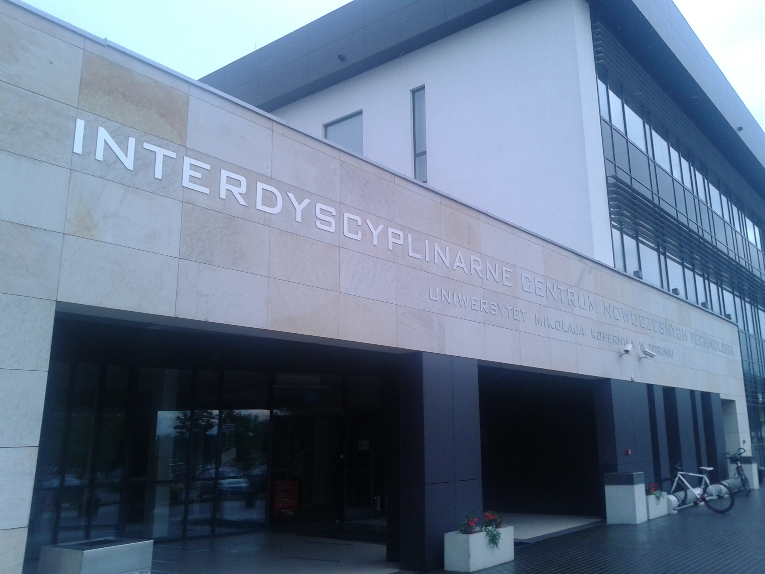 Budynek Interdyscyplinarnego Centrum Nowoczesnych Technologii UMK w Toruniu napis nad wejściem: INTERDYSCYPLINARNE CENTRUM NOWOCZESNYCH TECHNOLOGII UNIWERSYTET MIKOŁAJA KOPERNIKA W TORUNIU